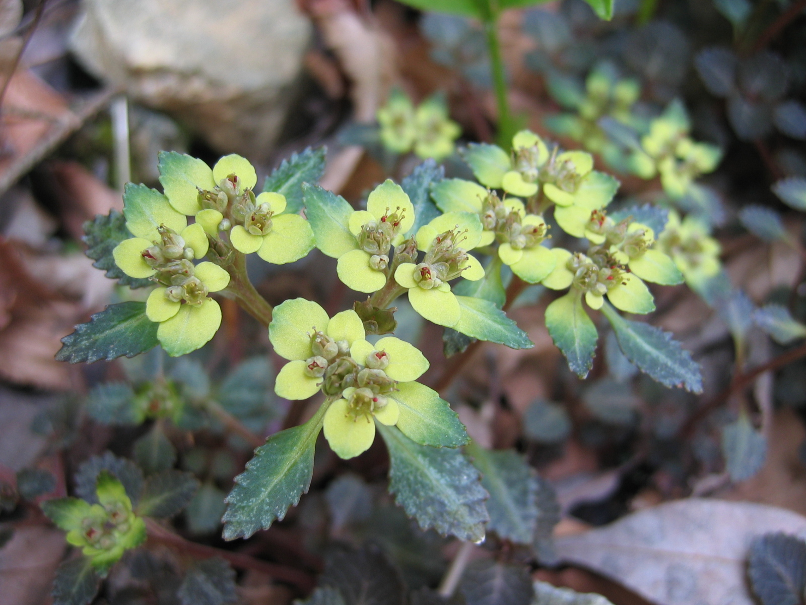 ヨゴレネコノメ (Chrysosplenium macrostemon)